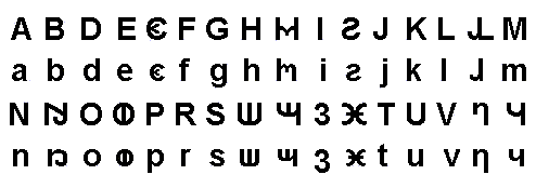 Het Sloveense Metelko-schrift zoals gebruikt door Fran Metelko.